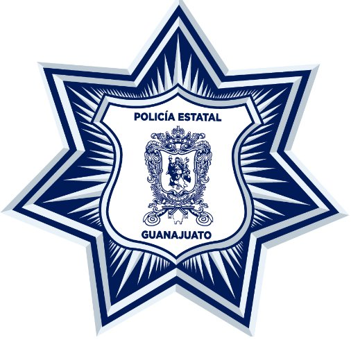 Escudo perteneciente a las Fuerzas de Seguridad Publica de Guanajuato